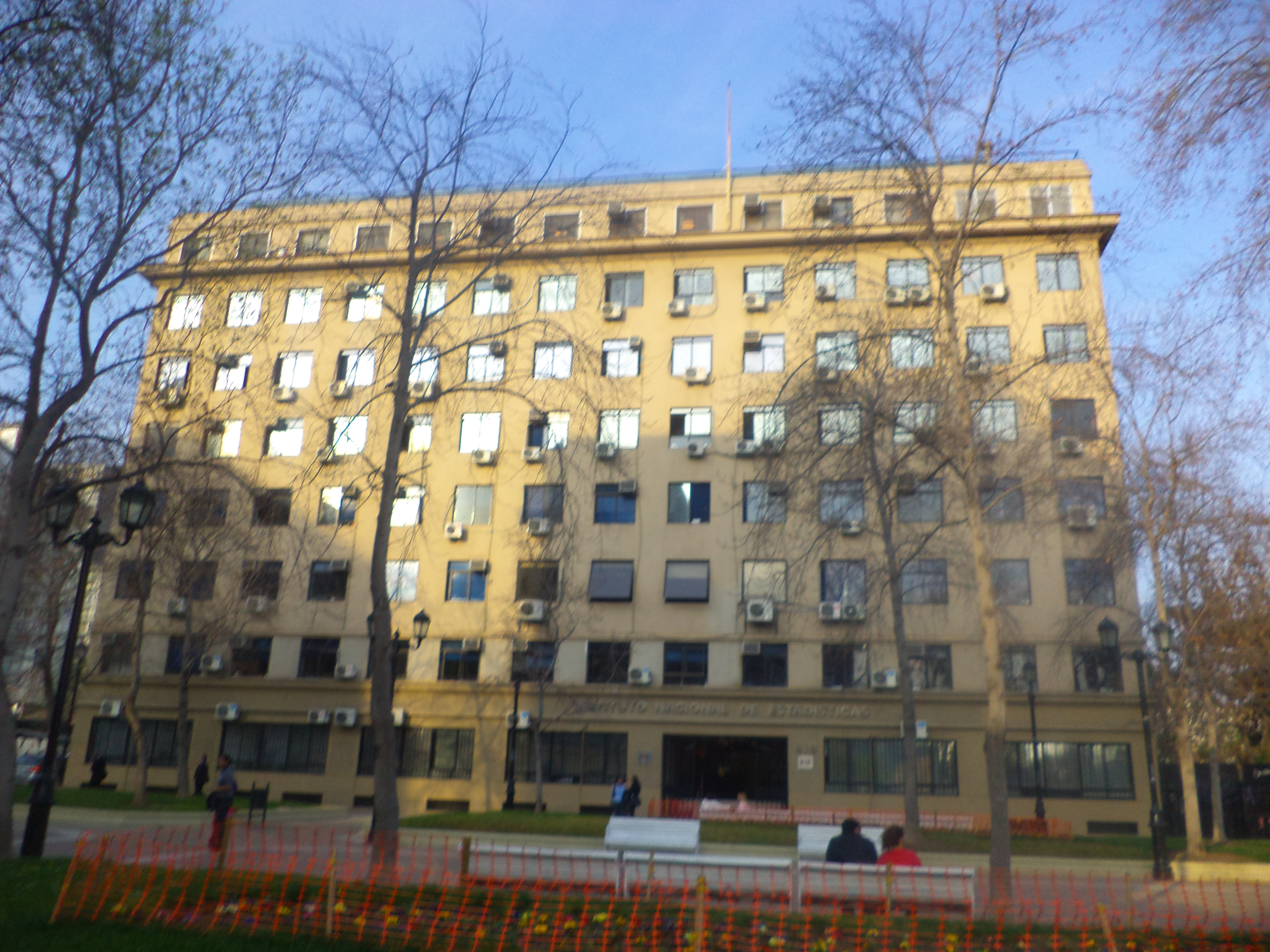 Edificio del Instituto Nacional de Estadísticas (INE) en el paseo Bulnes (lado poniente), casi al llegar al parque Almagro, Santiago de Chile.